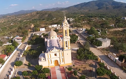 Templo parroquial en advocación al Señor de la Salud, construido en el siglo XVII